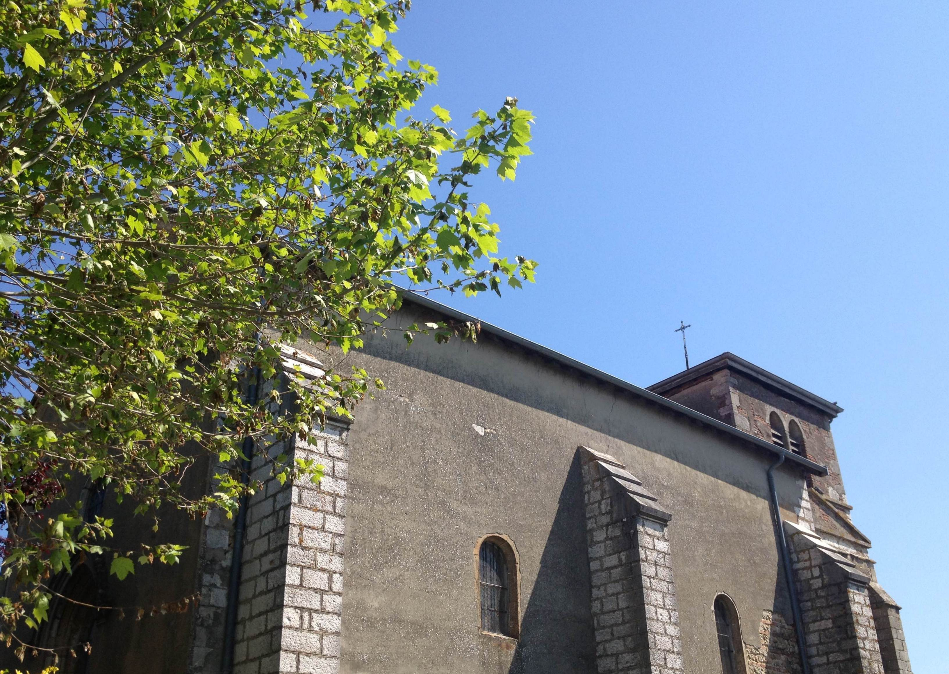 L'église de Lapeyrouse (Ain).